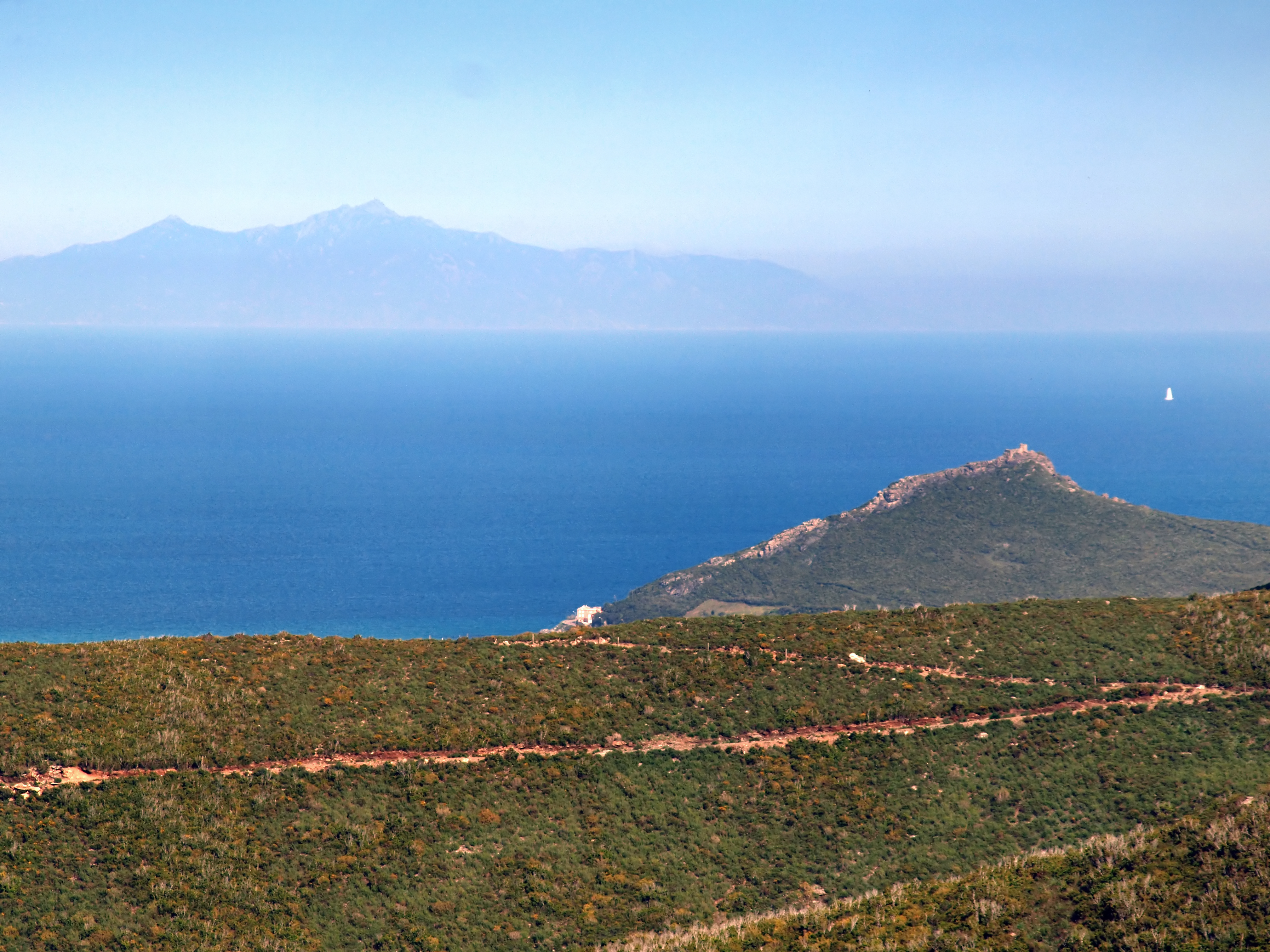 Pietracorbara, Cap Corse (Corse) - La tour de Castellare dominant la Marine vue depuis Cortina. Sur l'horizon, l'île d'Elbe.